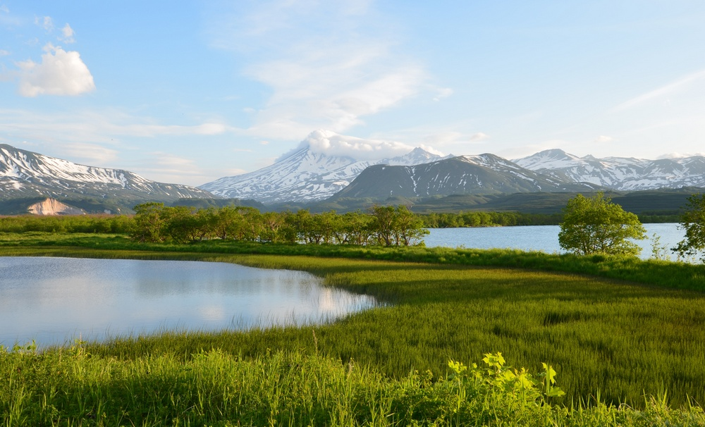 Южно-Камчатский, Елизовский район, Курильское озеро, кордон Травяной This image is related to the protected area of Russia number 4110070